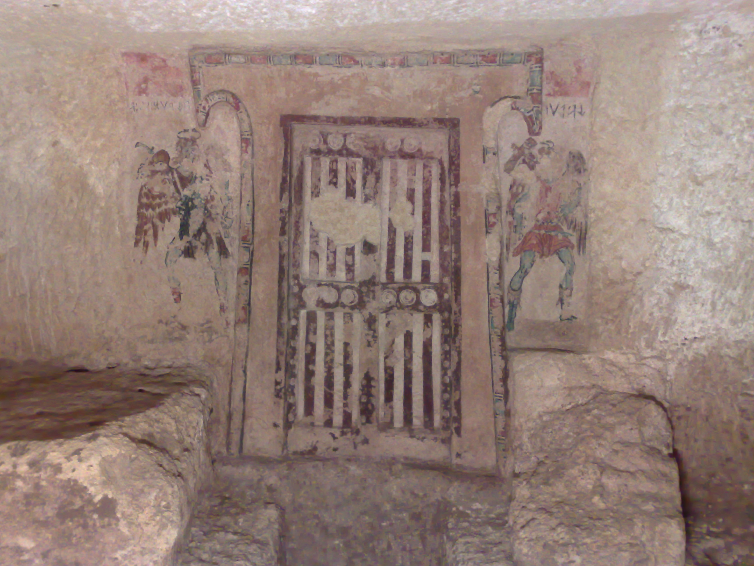 EMajor, foto scattata personalmente, affresco centrale tomba dei caronti, Creative Commons.